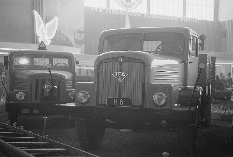 Original image description from the Deutsche Fotothek Frontansicht IFA-Lastkraftwagen H6